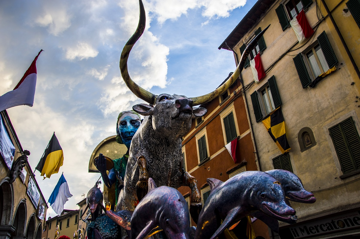 Carro del Cantiere Nottambuli al Carnevale di Foiano della Chiana 2015